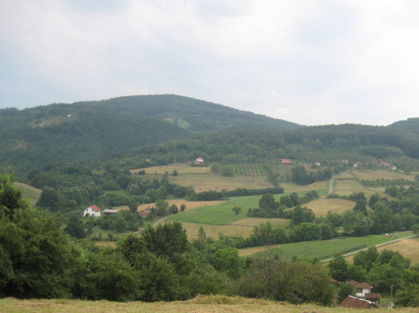 Поглед на Совљак из Рудина.